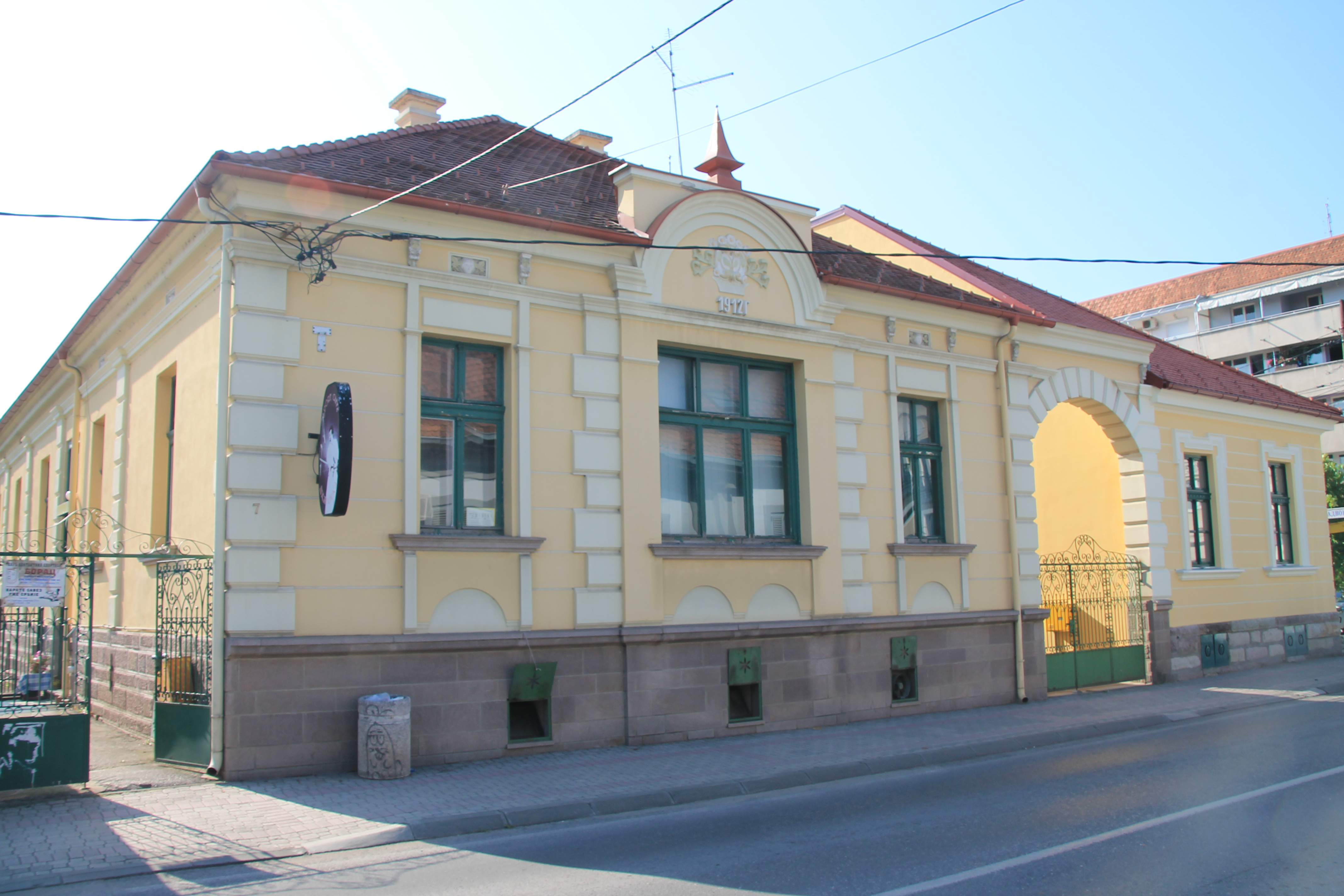 Buildings in Čačak